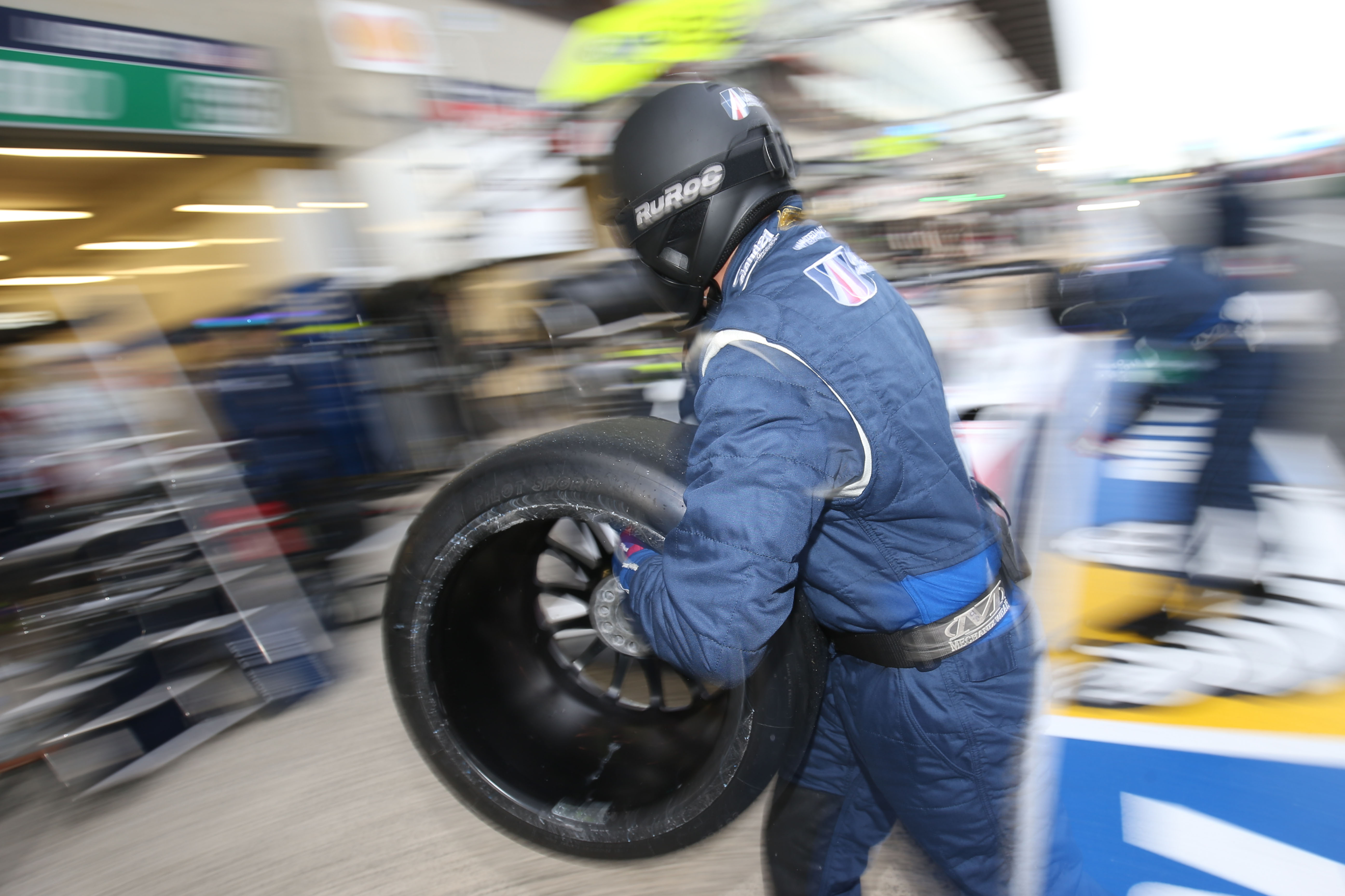 ua-1 (2)